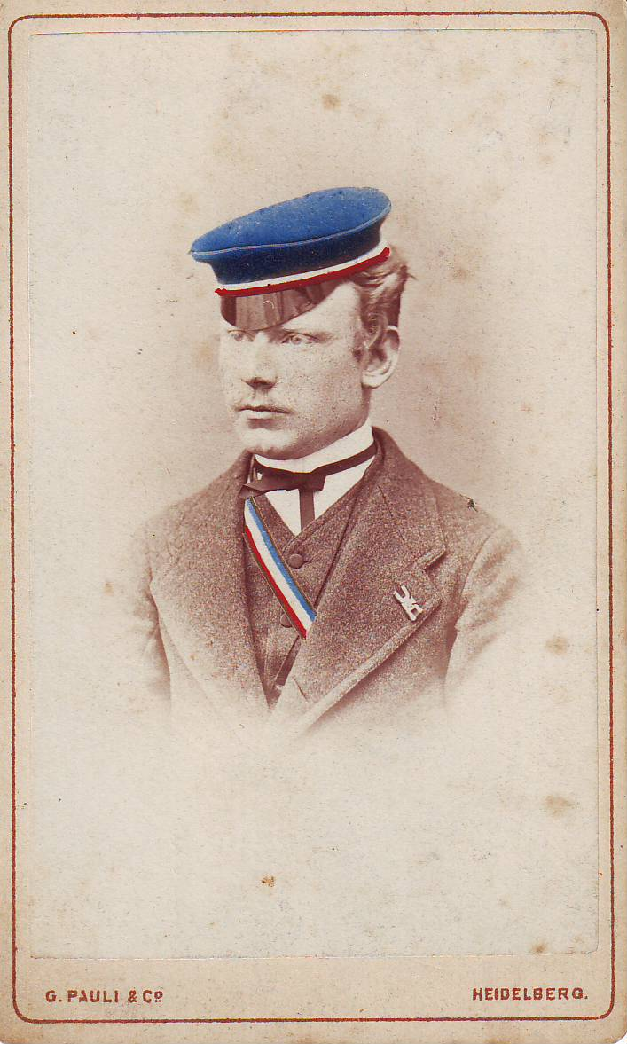 Franz Rotzoll als Heidelberger Rhenane